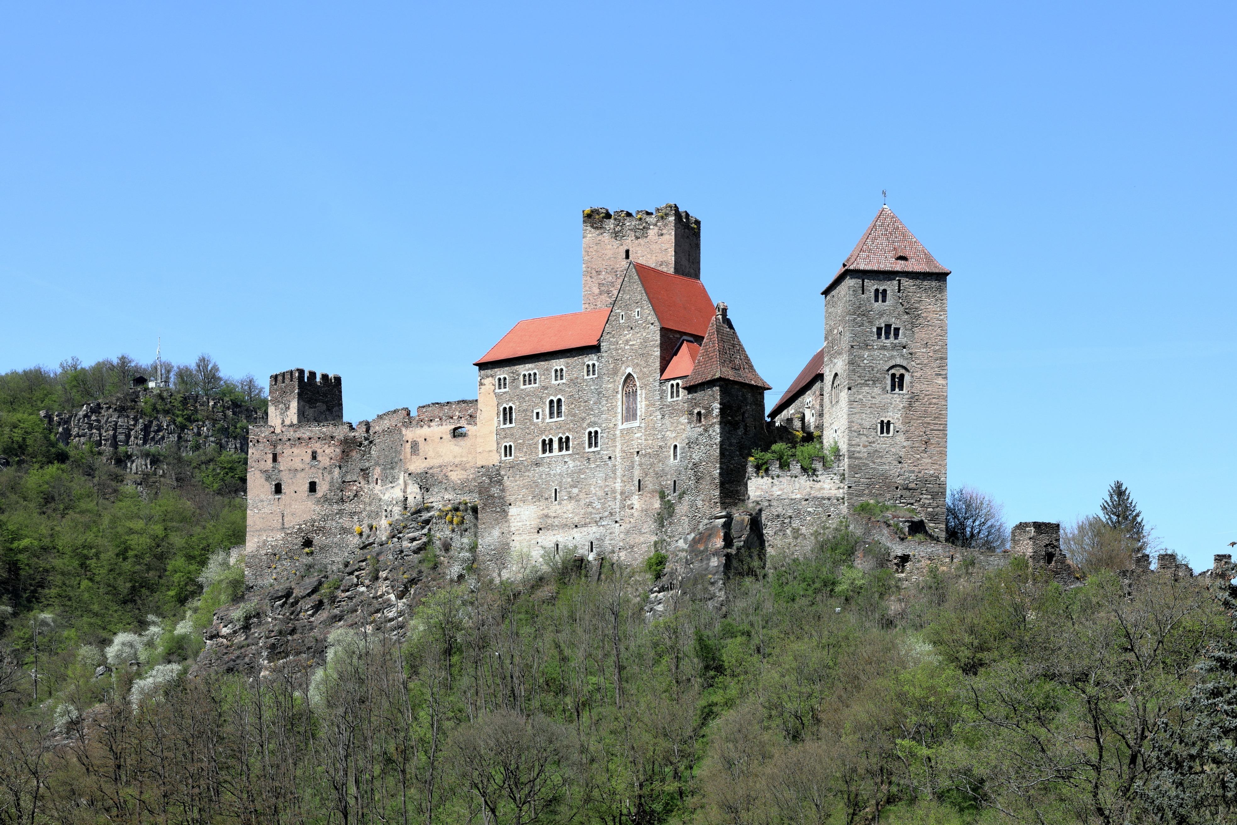 Südostansicht der Burg in der niederösterreichischen Stadt Hardegg.Eine ausgedehnte vielteilige mittelalterliche Anlage mit hochaufragendem Burgfried. Die Burg wurde vermutlich um die 11./12. Jahrhundertwende errichtet und nach einem Brand im Jahr 1506 erfolgte ein Umbau. Nach einem Erdbeben 1754 Verfall zu einer Ruine. Ab 1878 bis Anfang des 20. Jahrhundert wurde die Burg instandgesetzt und teilweise wieder aufgebaut.